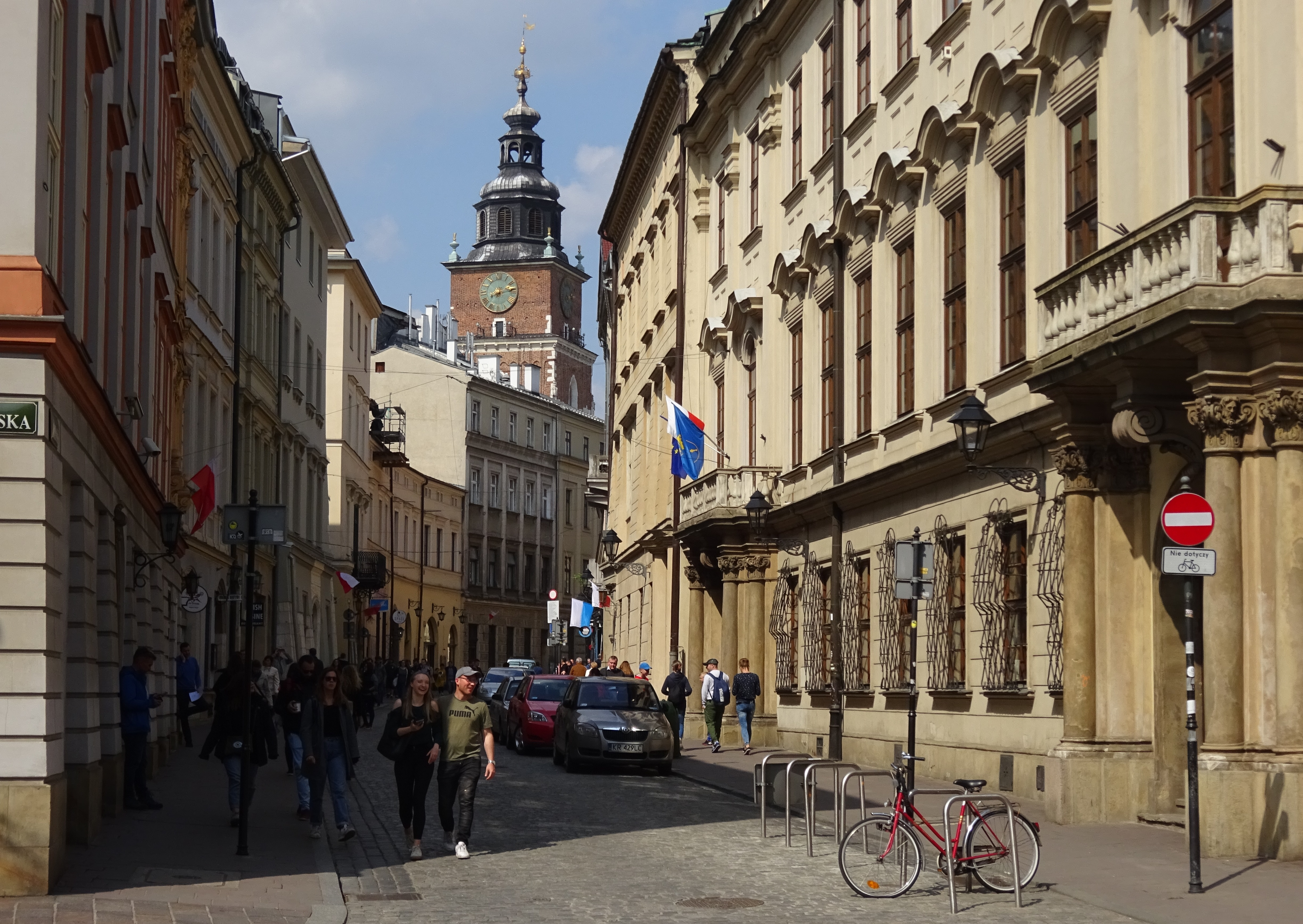 Ulica Bracka w Krakowie. Widok od skrzyżowania z ul. Franciszkańską w kierunku północnym. 2019